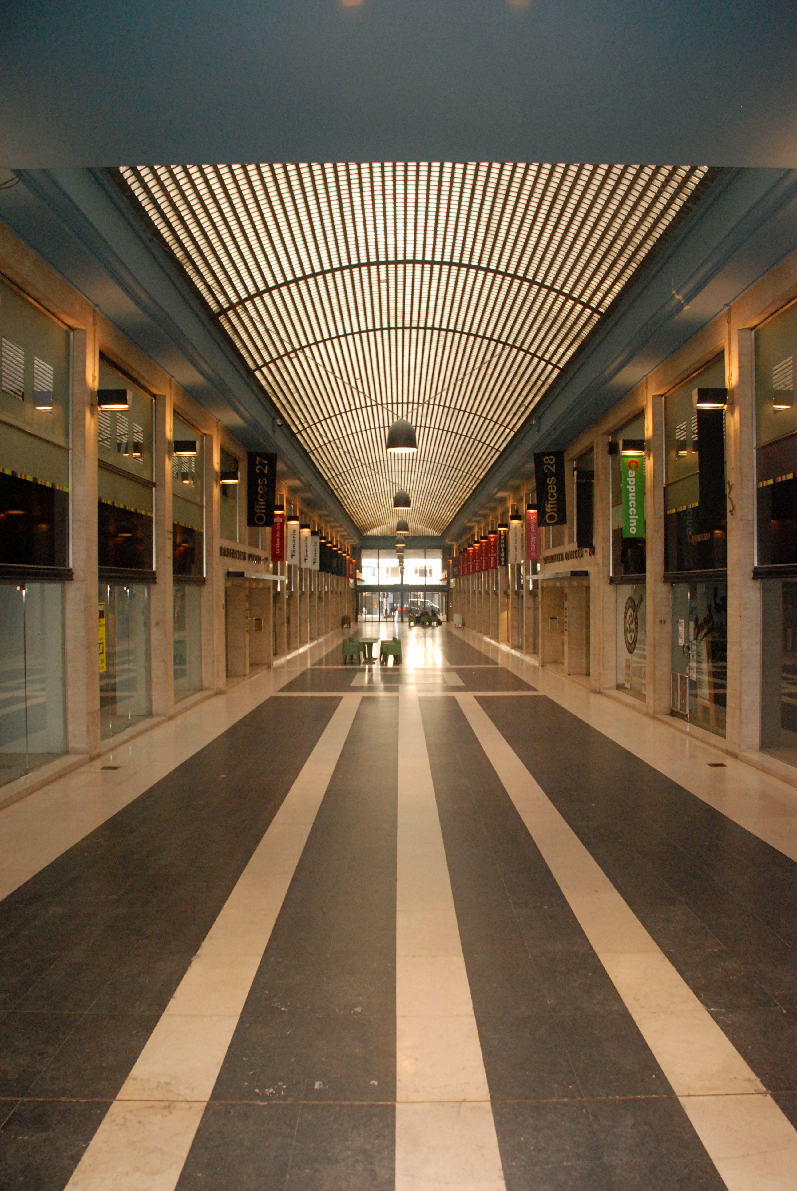 Belgique - Bruxelles - Galerie Ravenstein - Architecture monumentale - architectes Alexis et Philippe Dumont - 1954-1958